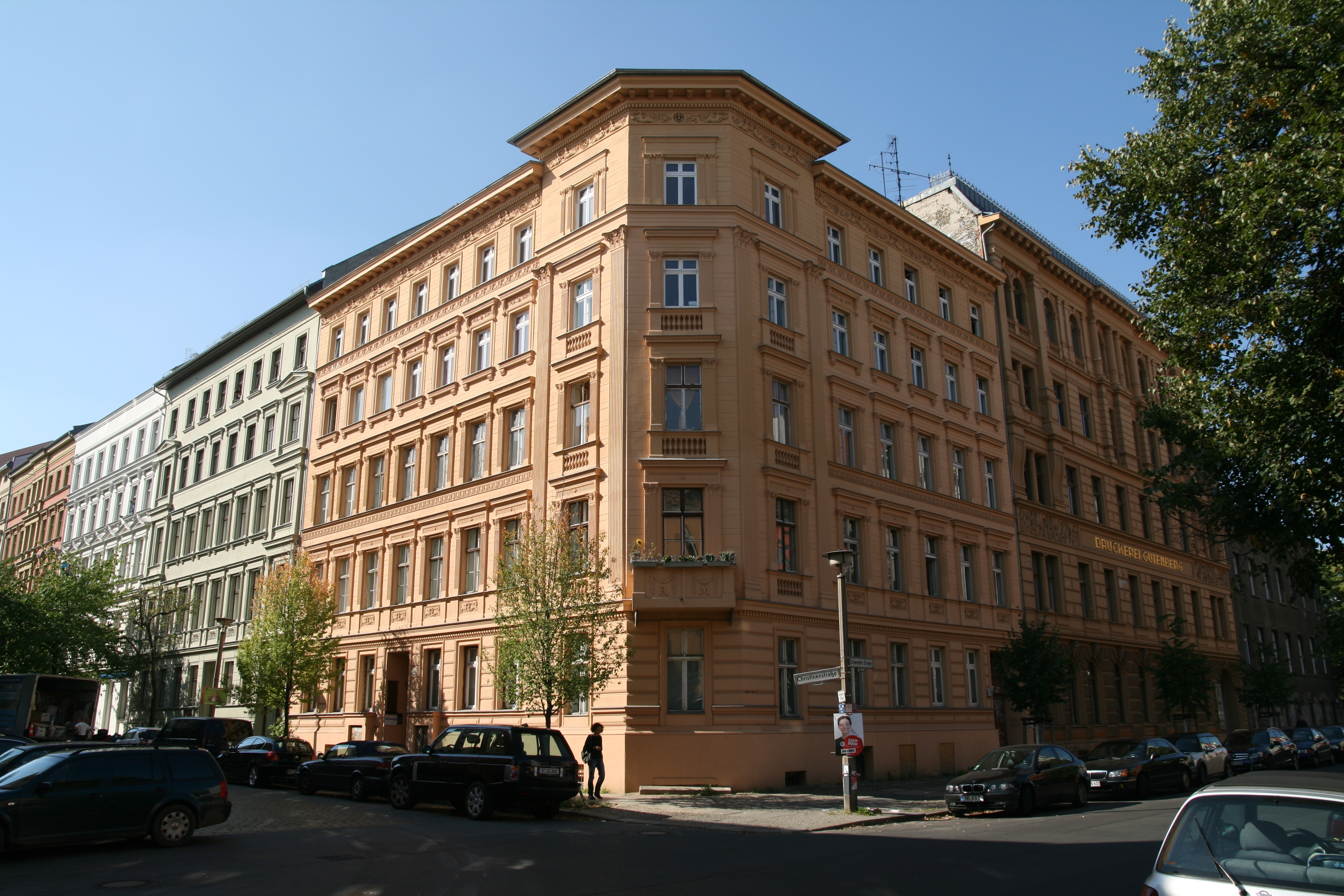 Eckhaus Schwedter Straße - Christinenstraße Schwedter Straße 264 + Christinenstraße 25